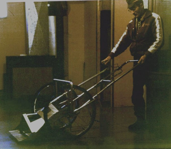 M. René Girard avec sa première cueilleuse à bleuets.